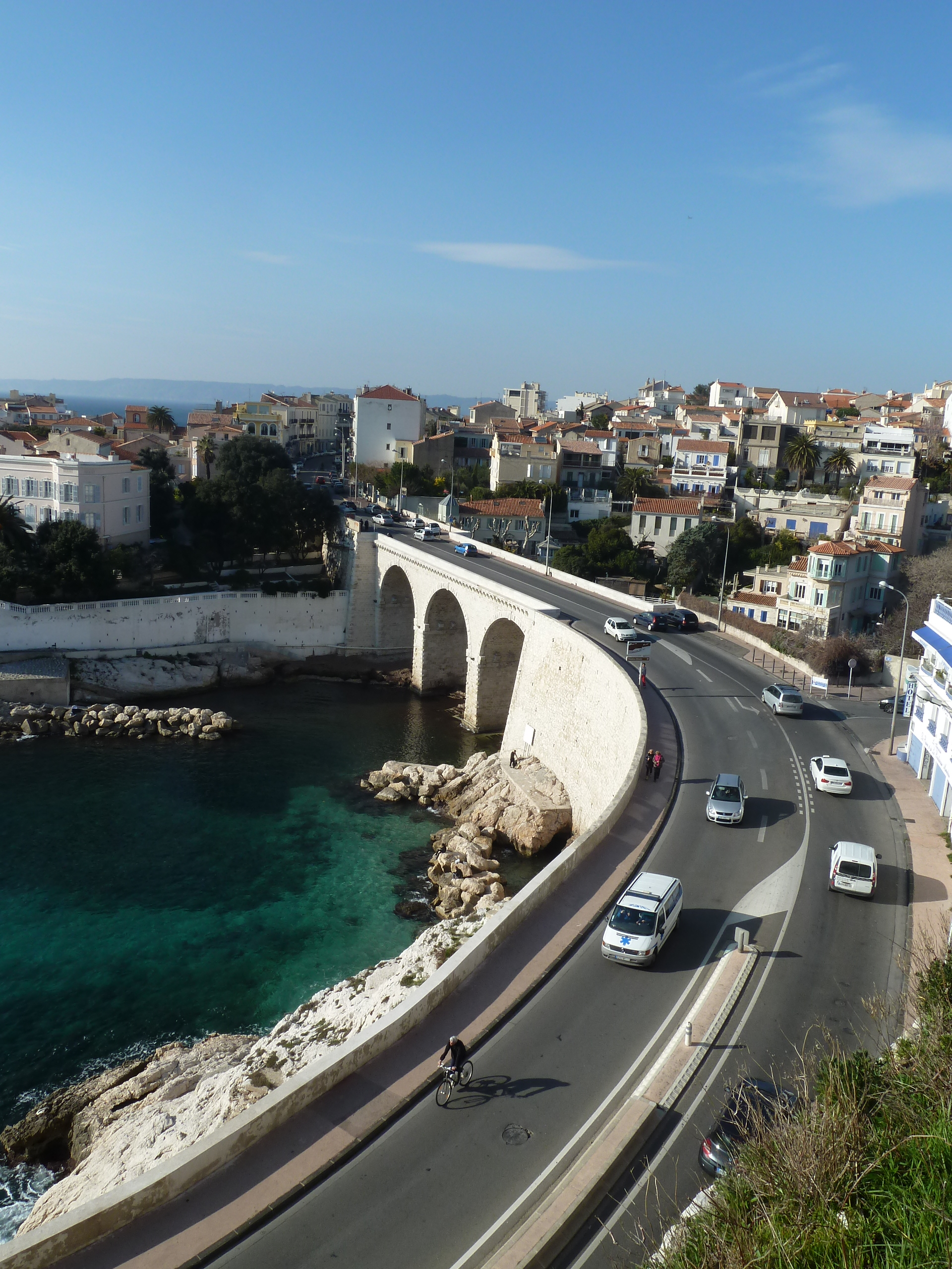 La Corniche du Président John Fitzgerald Kennedy et le Pont de la Fausse Monnaie dans le quartier d'Endoume à Marseille.